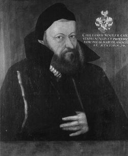 Gemälde in der Tübinger Professorengalerie